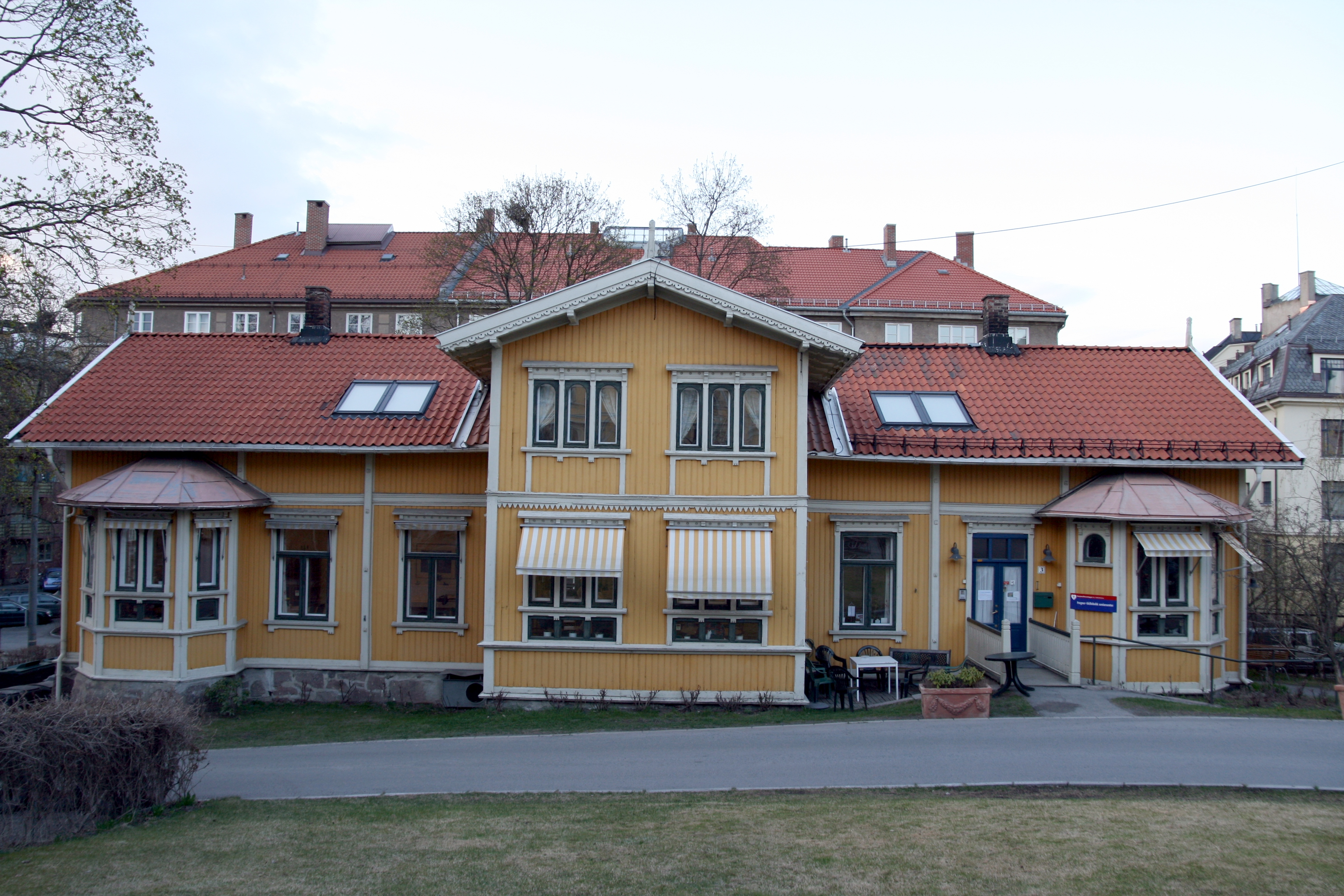 Sveitserhuset på Schafteløkken på Frogner i Oslo. Huset ble bygget på 1870-tallet, og har adresse Zahlkasserer Schafts plass 3.